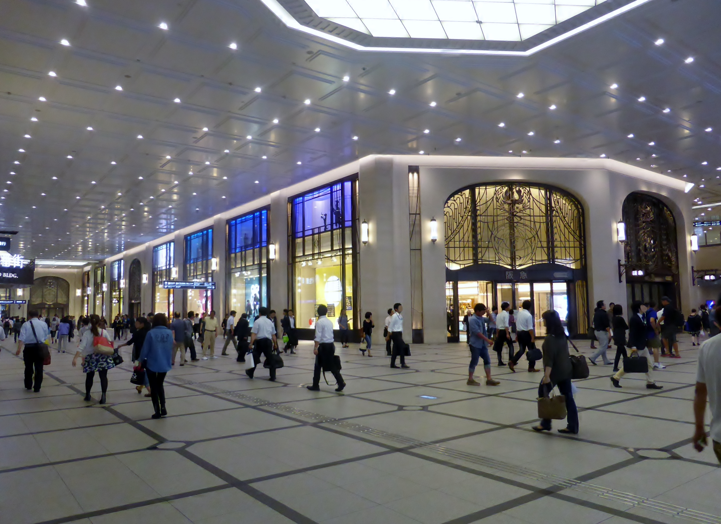 梅田阪急ビル内部を撮影。